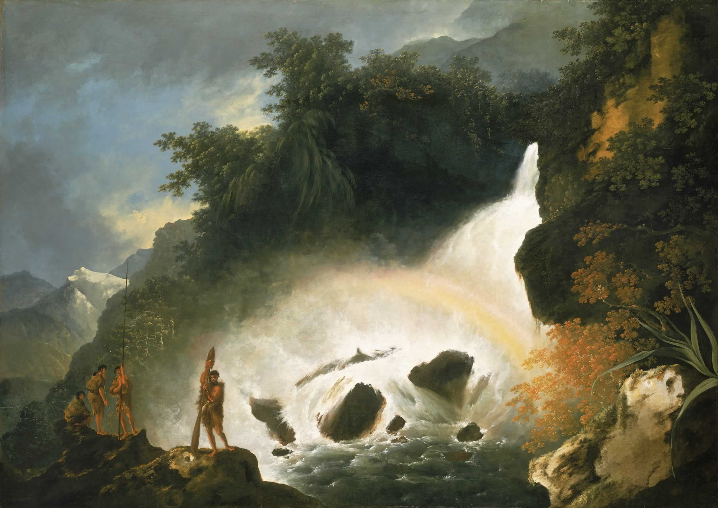 Cascade Cove, Dusky Bay